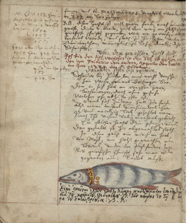 Abbildung des angeblich von Friedrich II. eingesetzten Hechts aus dem Böckinger See in einer Heilbronner Chronik. Siehe auch mit weiteren Nachweisen. Text: [...]fangen, vnd K[aiser] Maximiliano I. verehret worden, da er 267 [ihar] im See gelegen. Am Rand: NB. Es ist 157 ihar daß diser hecht gefangen v[nd] K[aiser] Max[imiliano] I. verehret worden. 1654 - 1497 = 157. Es ist aber itzo in disem 1654. ihar 424 ihar daß er in Böckinger See geworfen worden ist. 267 im See gelegen + 157 = 424 ihar. NB. Diser Hecht ist mit guoten farben nach seiner gröse, dicke v[nd] breite, mit dem ring am hals da[rin] griechische schrift gegraben, wie er gewesen, abc[on]terfeiet worden, vnd steth zu Hailprun vnter d[em] Brückenthor, mäniglich zu sehen, darbei dise Schriften: Vber dem gemahlten Hecht steth: Ich bin der Fisch, welcher in den Seh ist gethon worden von Friderico dem andern, Regenten der weltt im ihar 1230 den 5ten October. Darunter stehen die raimen: Schauw bei Hailpron mich recht versthe. Inn Weyer, genent Böckinger See. Der in sich hat an Wasser zwar, Sechsmorgen, doch ohne gefahr Welcher ohn abzulassen ist. Was sich zu tragen hat zur frist. Als man tausent vierhundert ihar Vnd neintzig sieben gezehlet war Nach Jhs vnsers Seligmachers geburth Ein solcher Hecht drin gfangen wurdt Der gestaltt so hie abgemahlet steth In diser größ ein ring an hett Von Meß, am hals gewachsen ein Starck, under der floß federn sein Mitt griechischer schrift sahe man allda gegraben ein: Lautet also [folgt das Bild des Fisches mit Ring am Hals und Inschrift] εἰμὶ ἐκεῖνος ἰχθύς, ταύτῃ λίμνῃ παντόπρωτος ἐπετεθεὶς διὰ τοΰ Κοσμητου Φεδηρίκου ʹß τὰς χειρὰς ἐν τῇ ʹε ἡμέρᾳ τοῦ ᾿Οκτοβρίου ʹα ʹσ ʹλ.